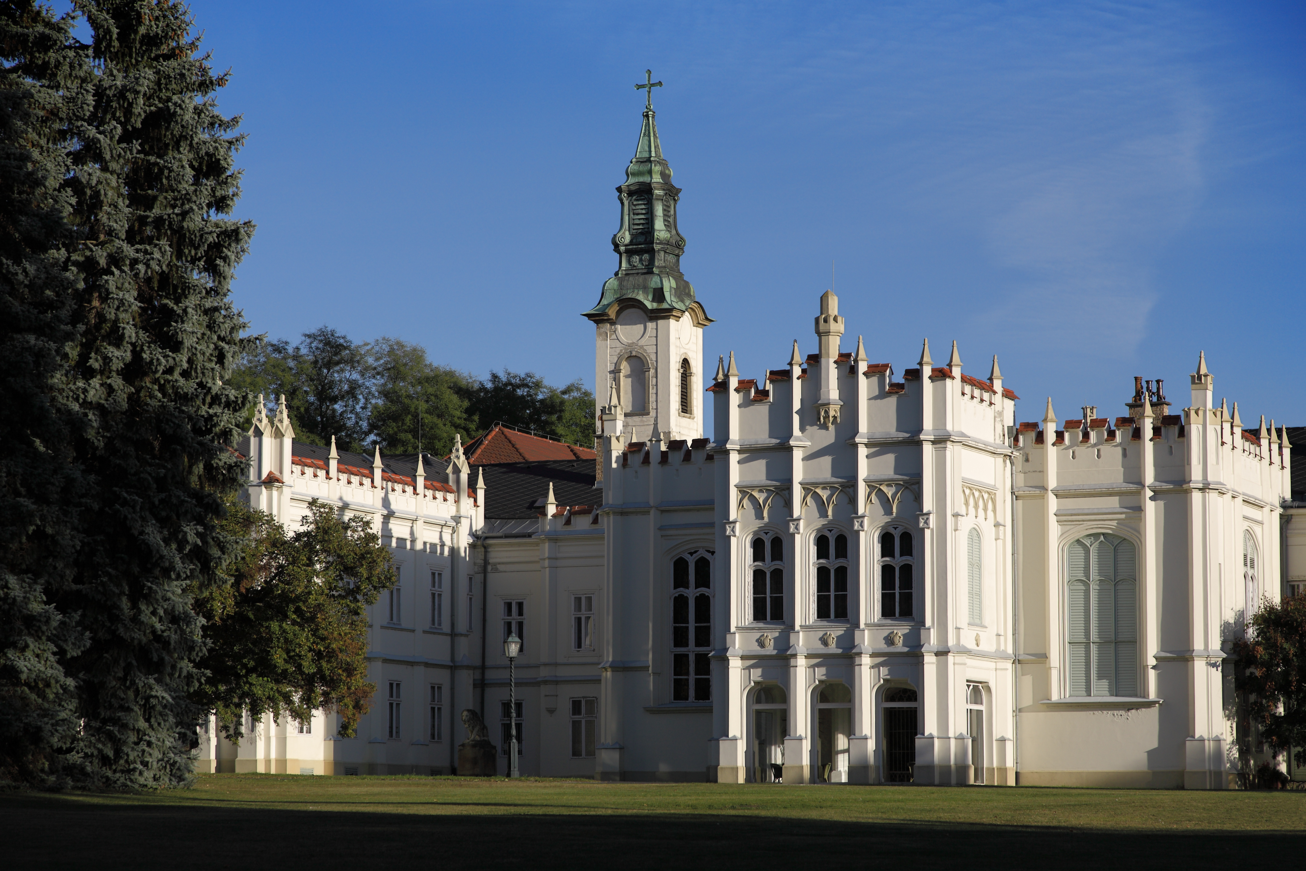 A martonvásári Brunszvik-kastély